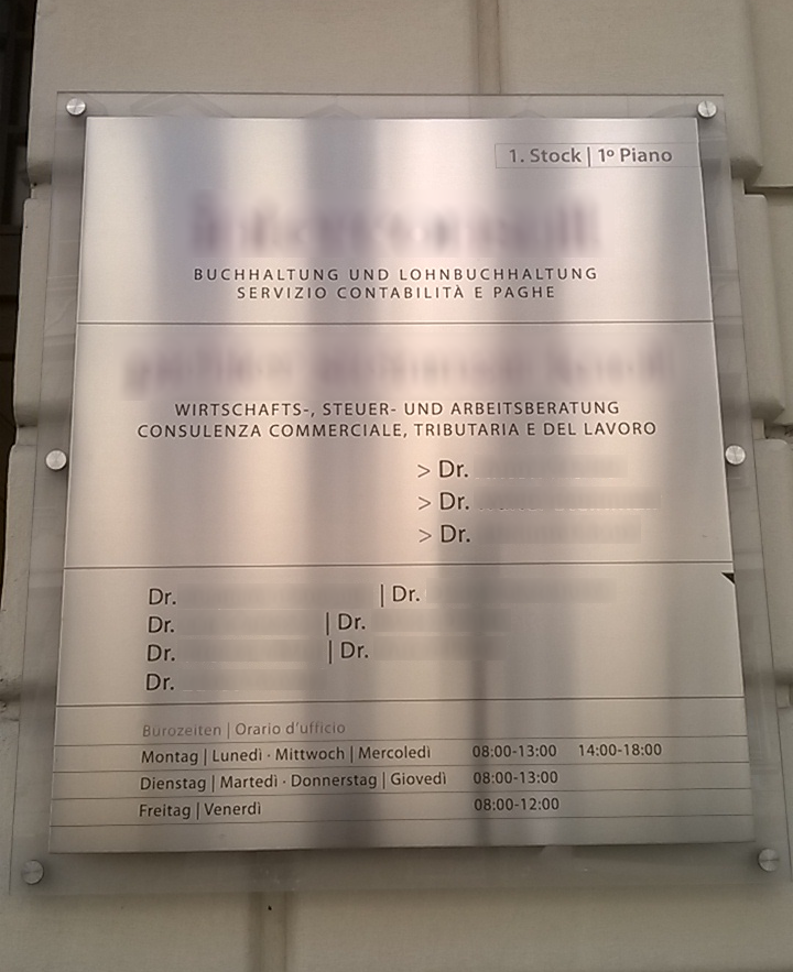 Schild einer Wirtschaftskanzlei in Bozen mit angeblich sage und schreibe zehn (10!) promovierten Mitarbeitern und Inhabern. Illustriert wird der in Südtirol übliche Usus, den italienischen Titel "dottore", den ausnahmslos jeder Akademiker zu tragen berechtigt ist, ins Deutsche mit "Doktor" oder "Dr." zu übersetzen, obwohl dieser Titel im deutschen Sprachraum allein für promovierte Akademiker reserviert ist. Dies geschieht unter Ausnutzung mangelnder rechtlicher Bestimmungen in Italien, in Österreich oder Deutschland hingegen werden derartige Titelanmaßungen mit empfindlichen Geldstrafen oder gar Freiheitsstrafen geahndet. Ein nicht promovierter "Doktor" wird in Südtirol scherzhaft "Brennerdoktor" genannt.